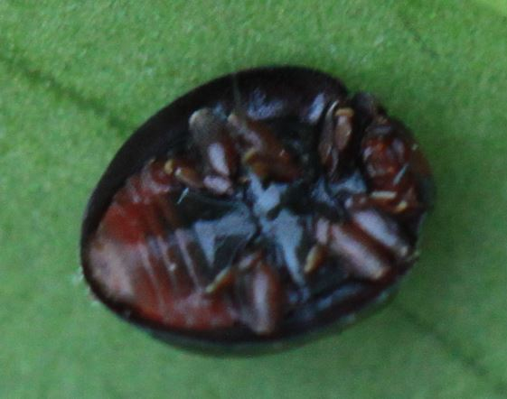 Ventralansicht - Strichfleckiger Marienkäfer (Chilocorus bipustulatus) am 17.3.2018 südlich von Mannheim